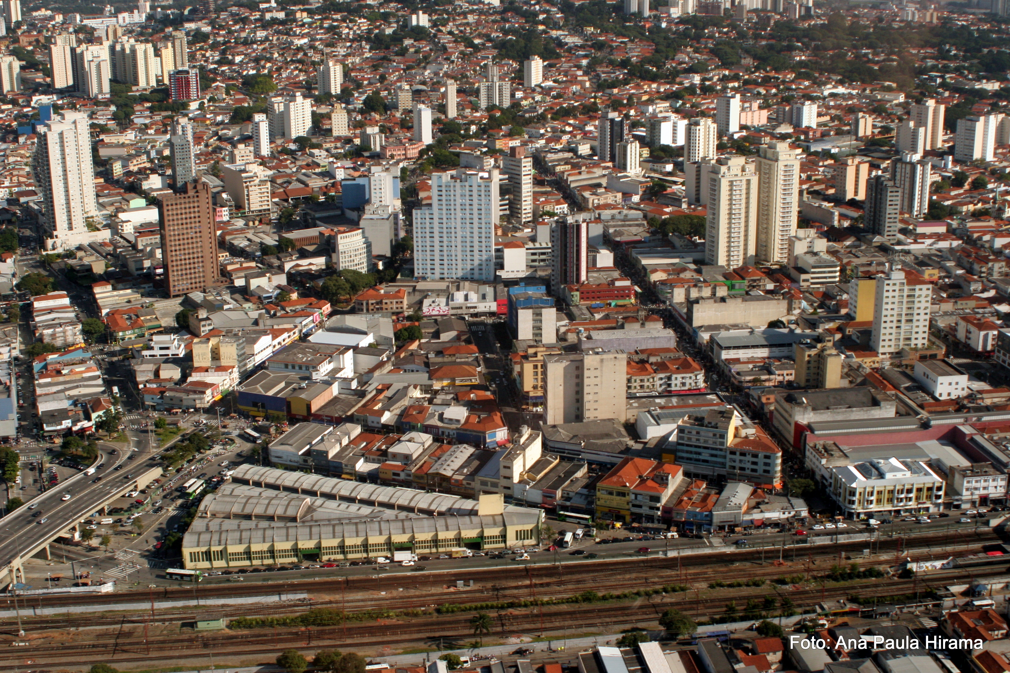 Sao Paulo, Brazil